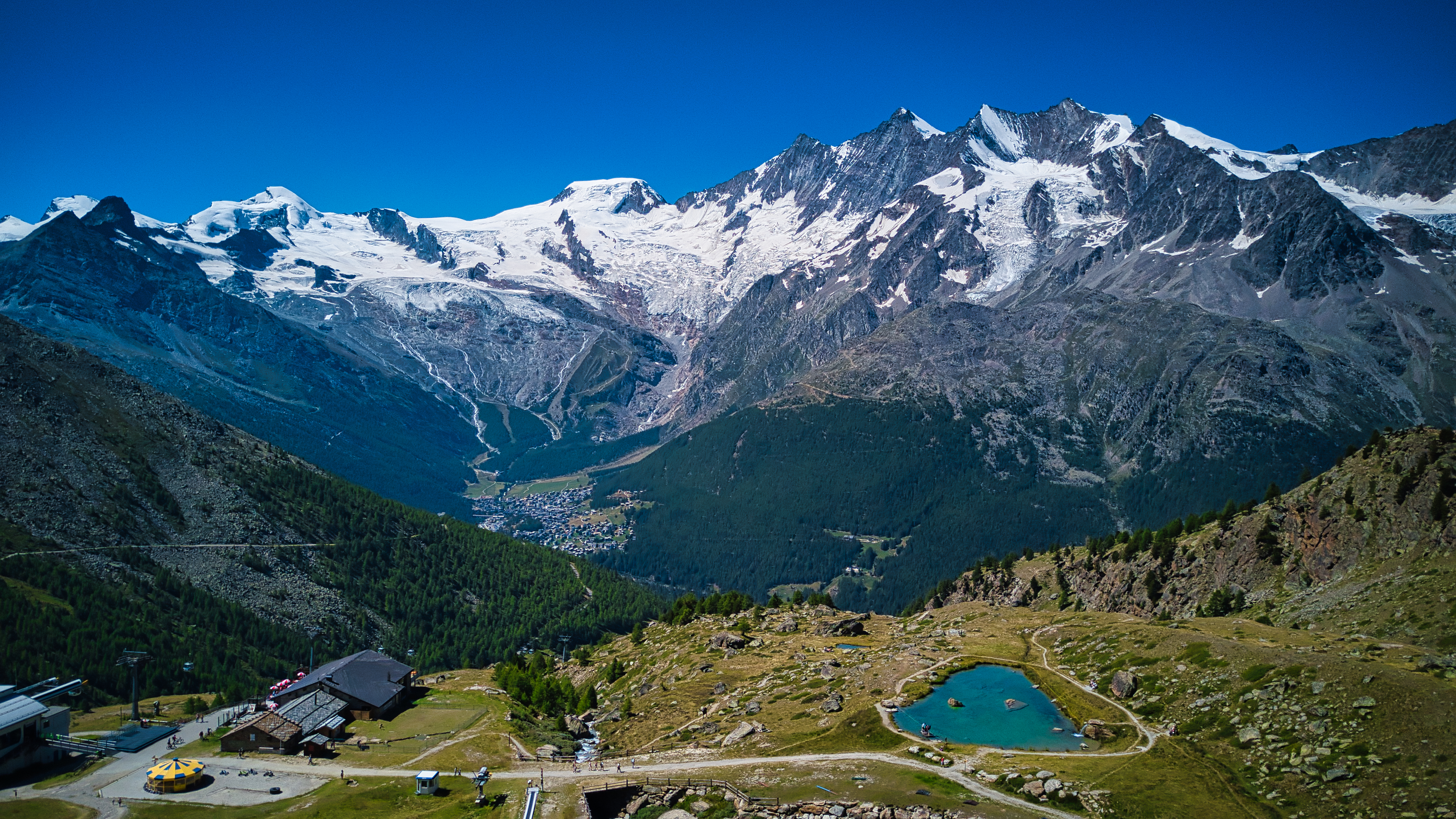 Kreuzboden auf 2400m